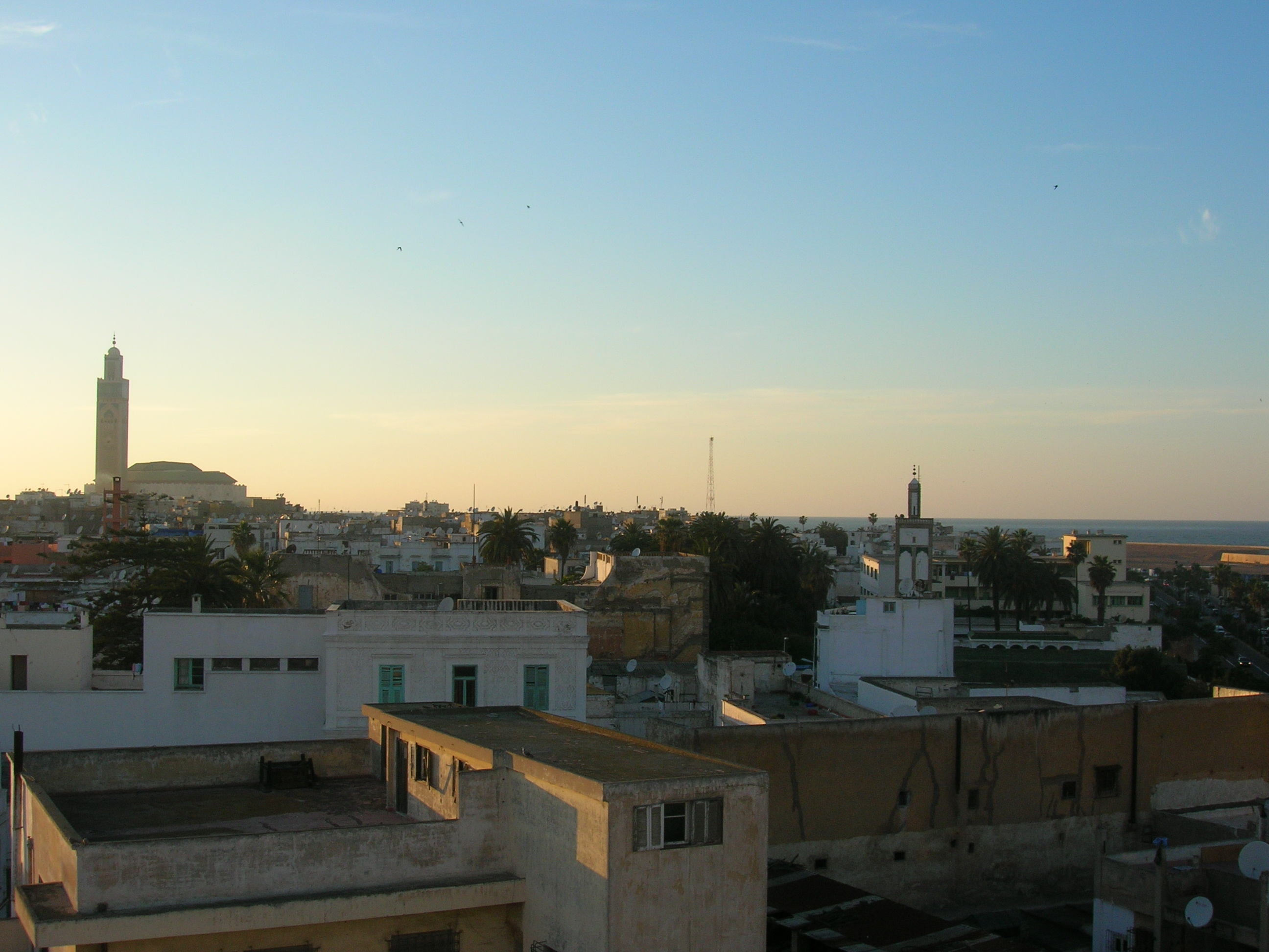 Parte del 'skyline' de Casablanca. Atardecía. Al fondo se ve el minarete de la mezquita de Hassan II.